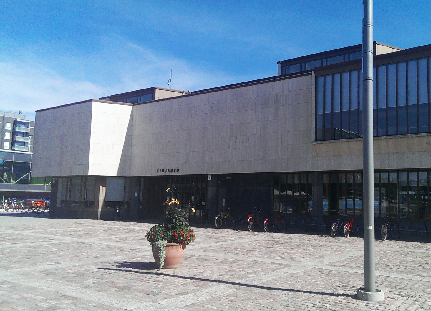 Hyvinkään kaupungin pääkirjasto